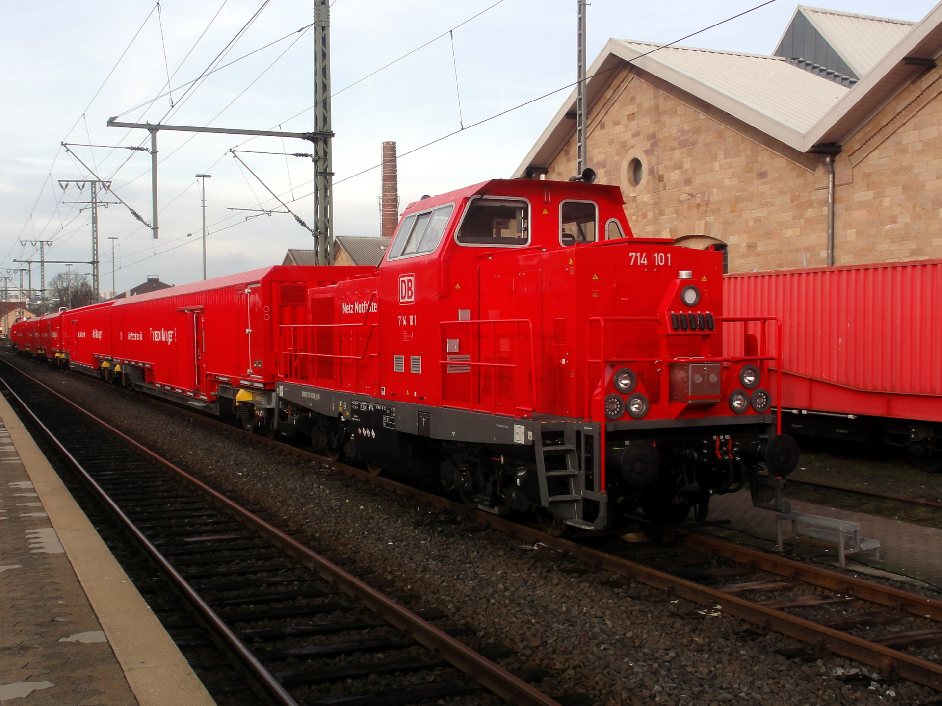 Rettungszug der DB Netz Notfalltechnik in Fulda. Der Zug besteht aus 9980 9170 001-8 (714 101), 9980 9370 157-6 (Transportwagen 2), 9980 9370 152-7 (Sanitätswagen), 9980 9370 021-4 (Löschmittelwagen), 9980 9370 018-0 (Gerätewagen), 9980 9370 104-8 (Transportwagen 1) und 9980 9170 002-6 (714 102).